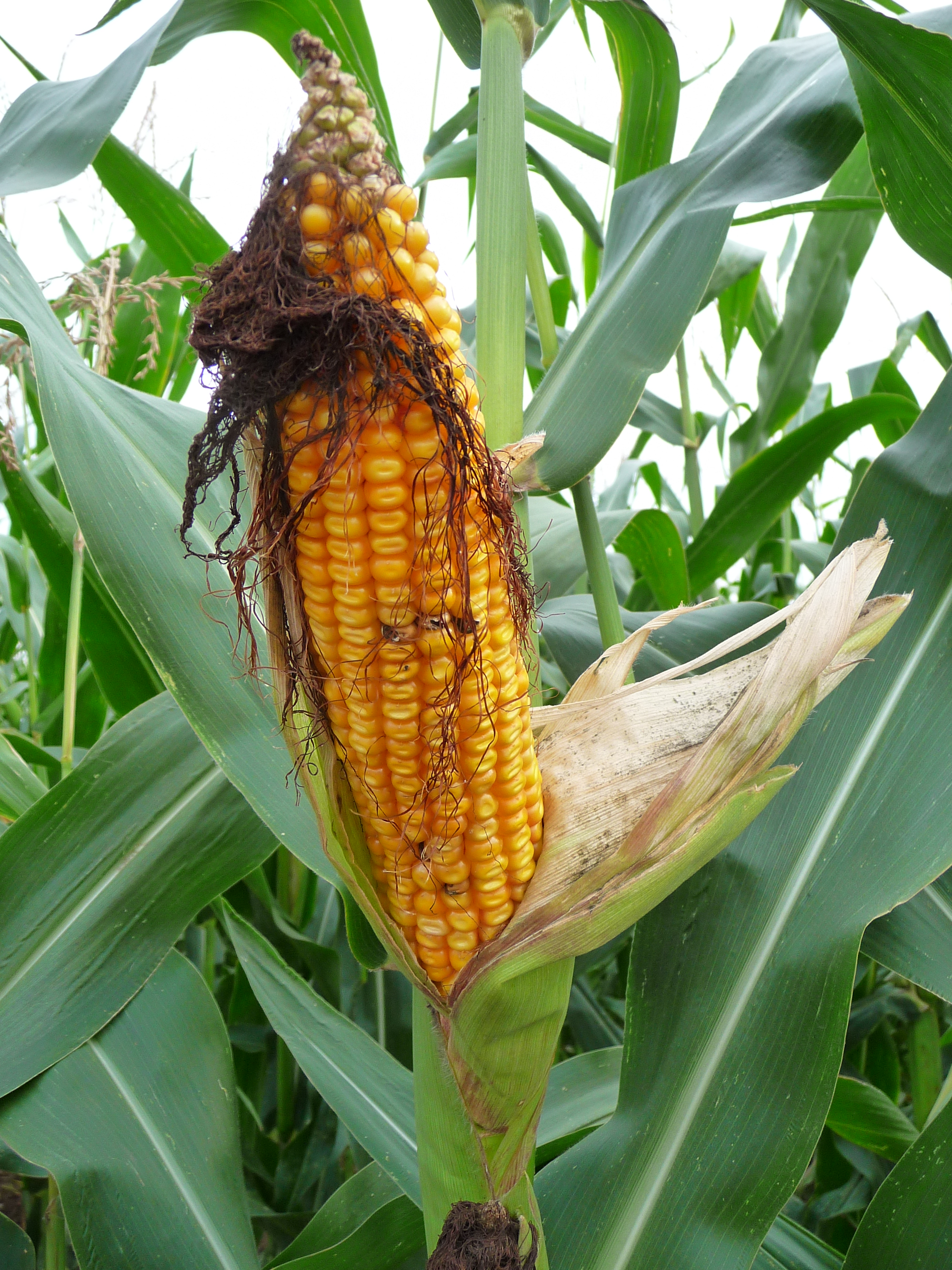 Reifer Maiskolben (Zea mays), fotografiert im nördlichen Baden-Württemberg (Deutschland)